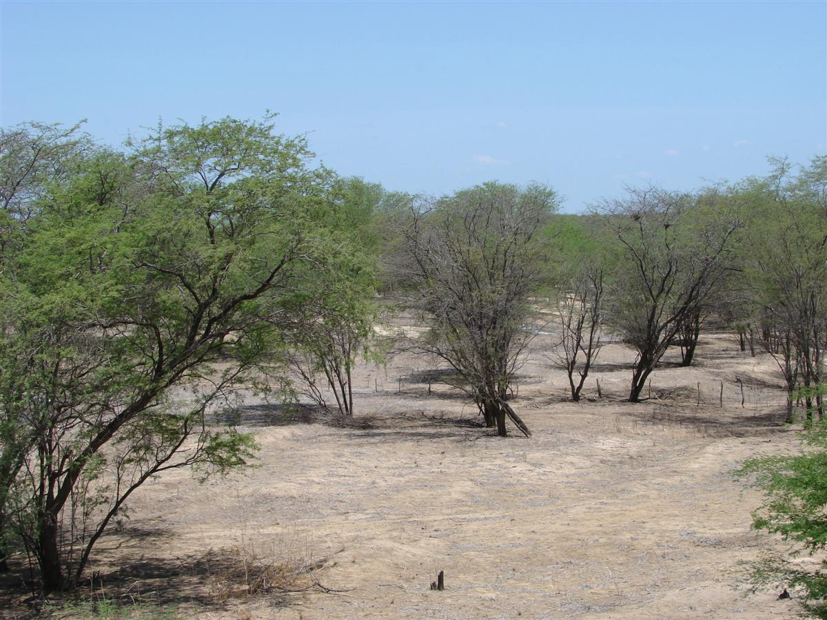 Caatinga com mais de 40ºC no semi árido. Pés de algaroba (Prosopis juliflora), espécie exótica, dominam a paisagem.